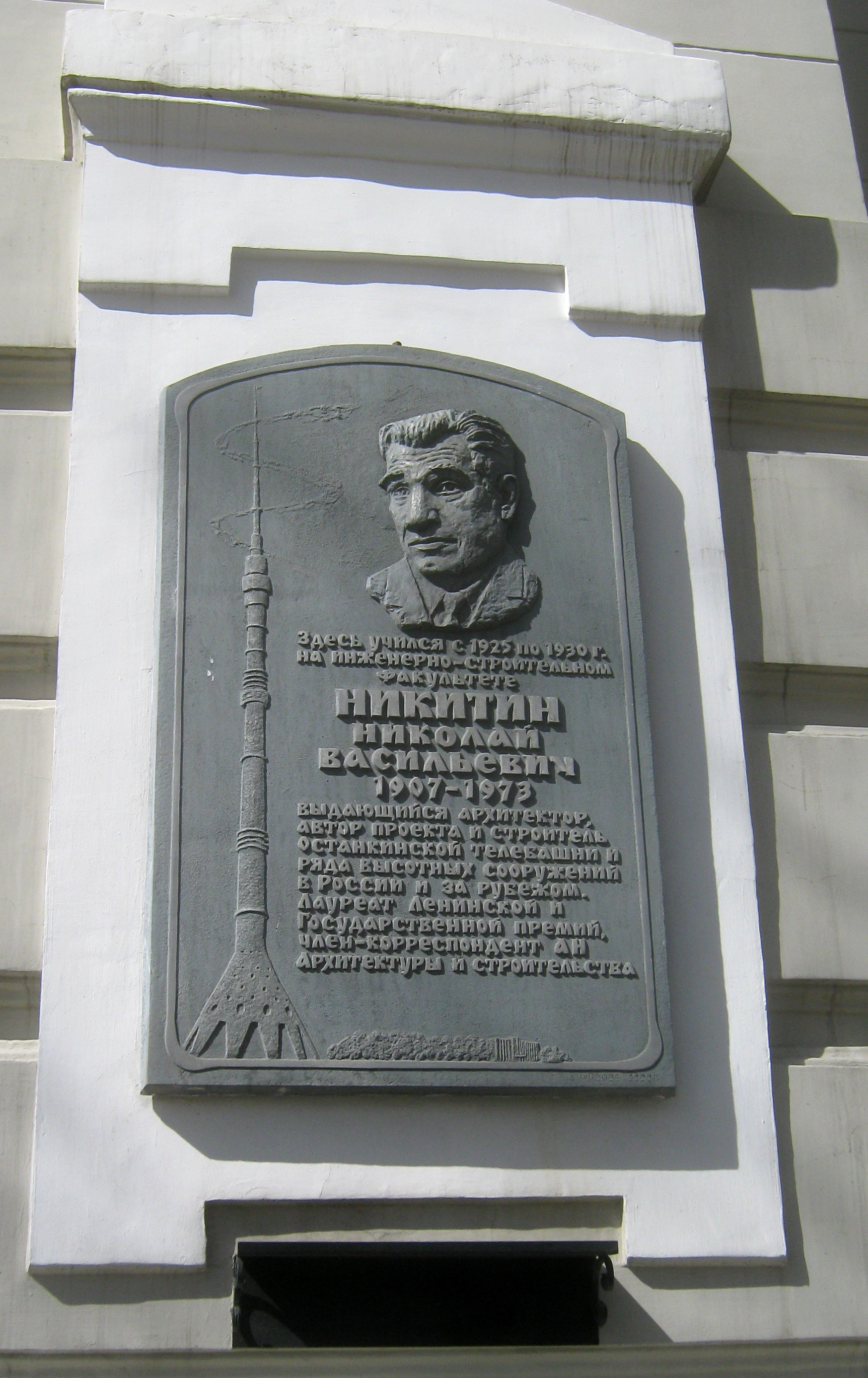 Проспект Ленина 30а, Томск